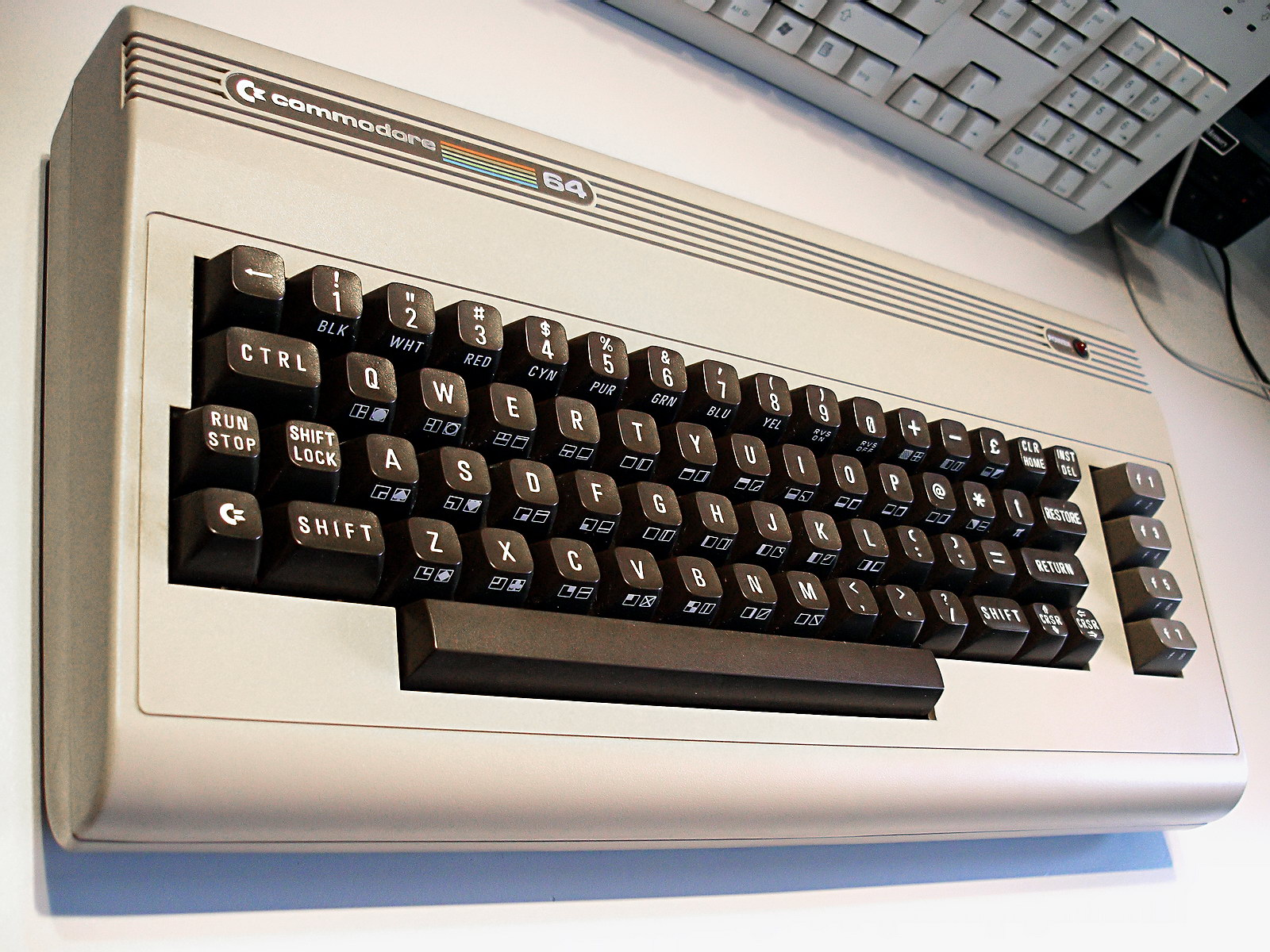 Commodore C64